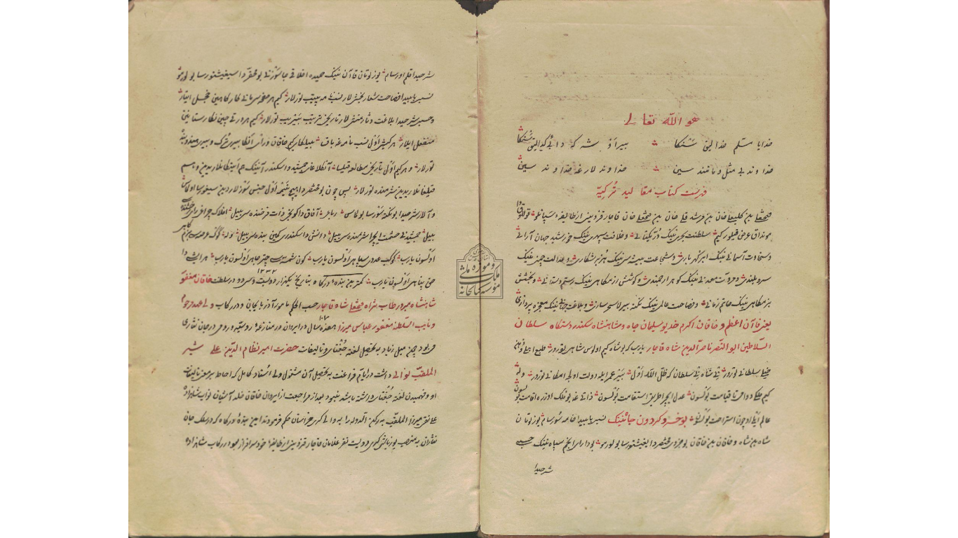 تۆرکجه: مقالید الترکیه کتابی‌نین باشلانیشی، ملی ملک موزه‌سی‌نین الیازماسی